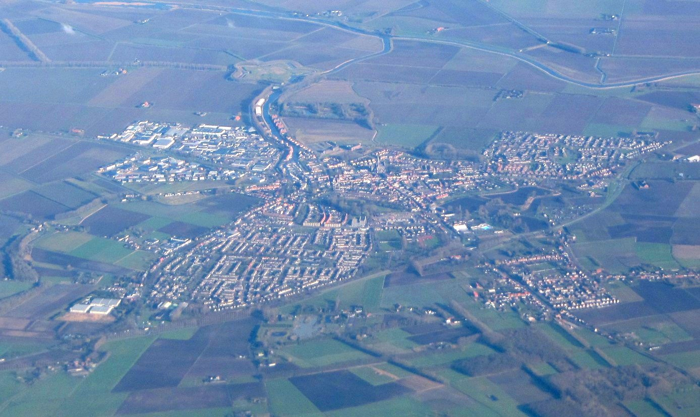 Luchtfoto van Steenbergen